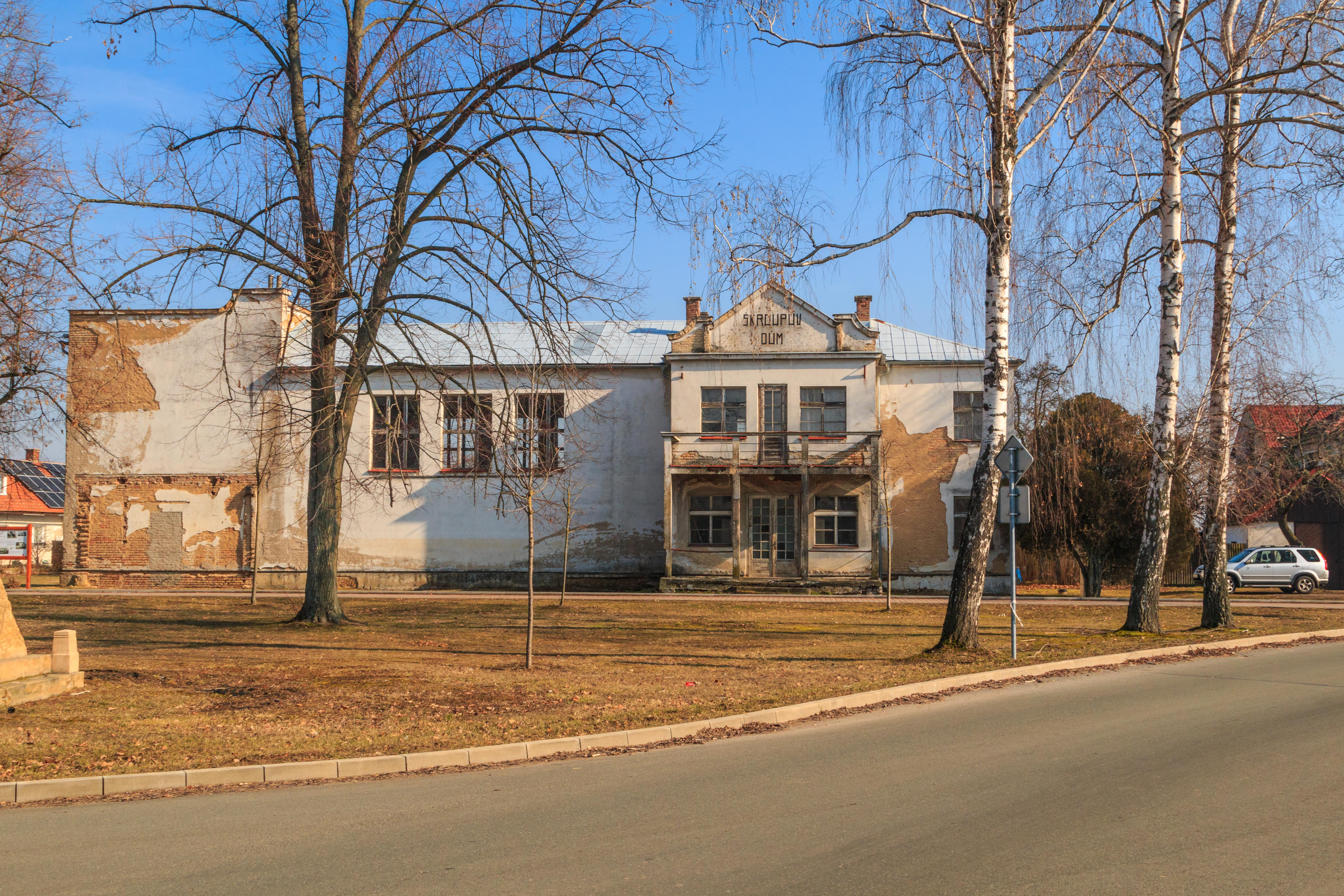 Škroupův dům v Osicích